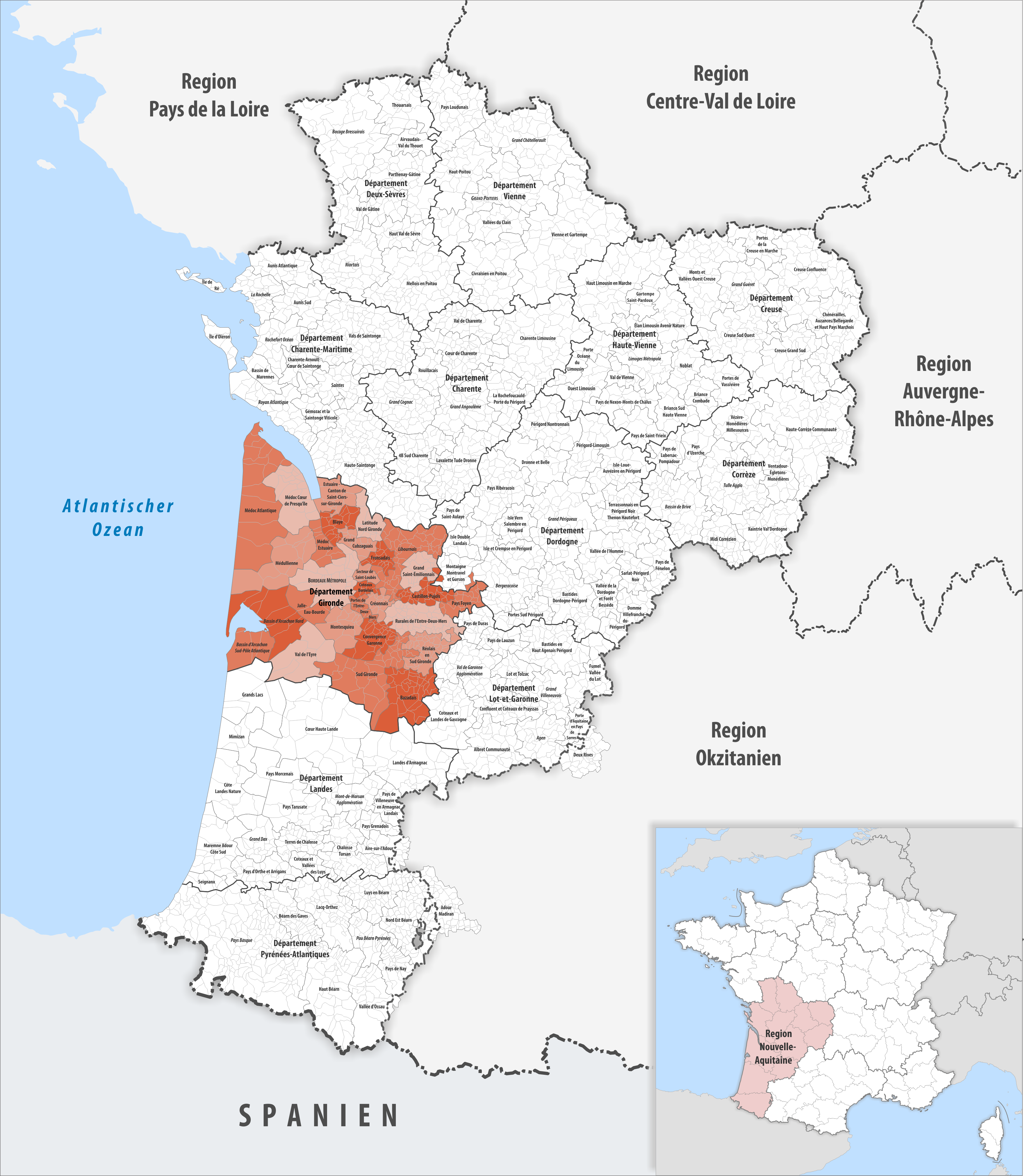 Gemeindeverbände im Département Gironde